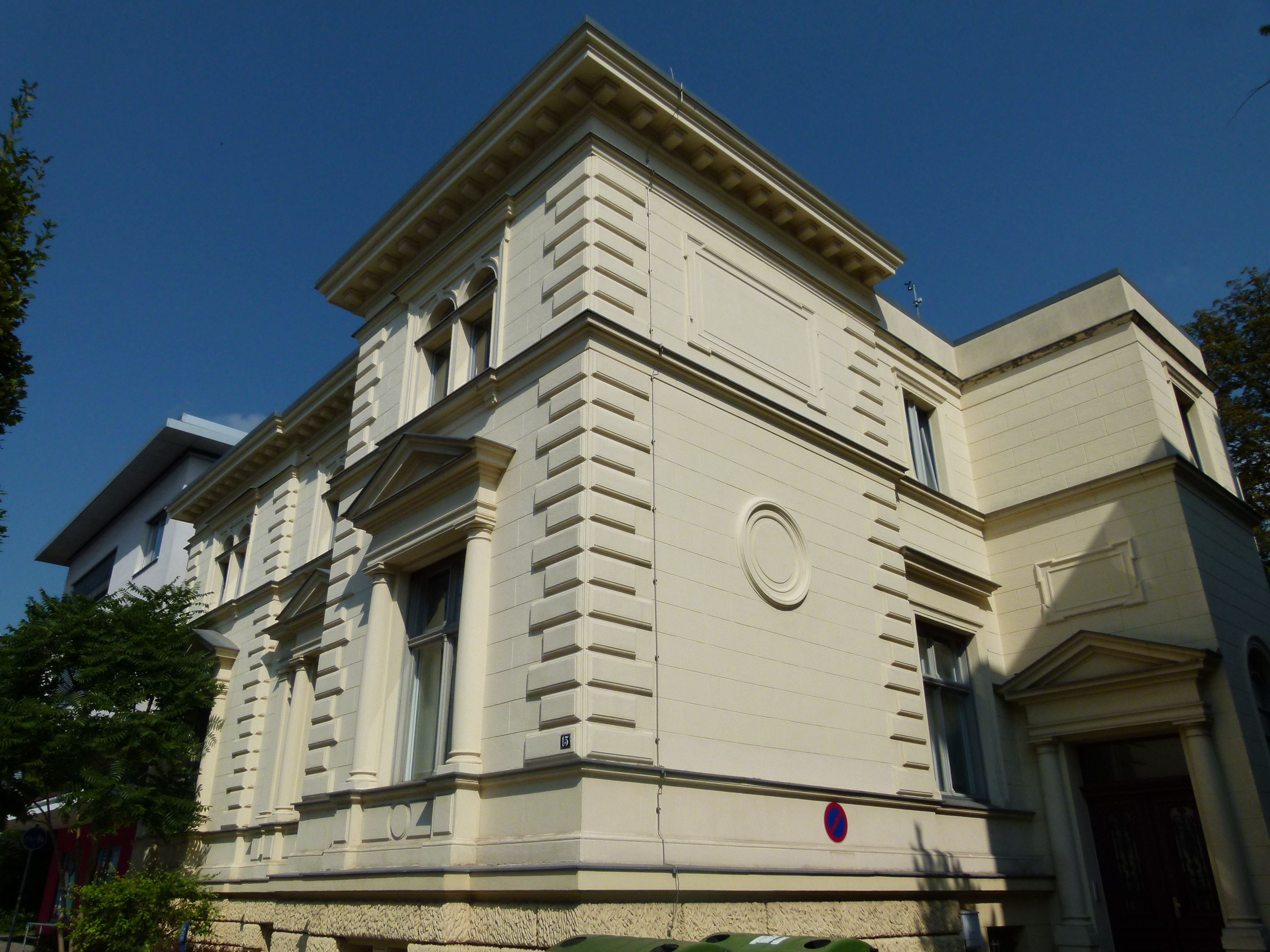 15 Bahnhofstraße 2014.1